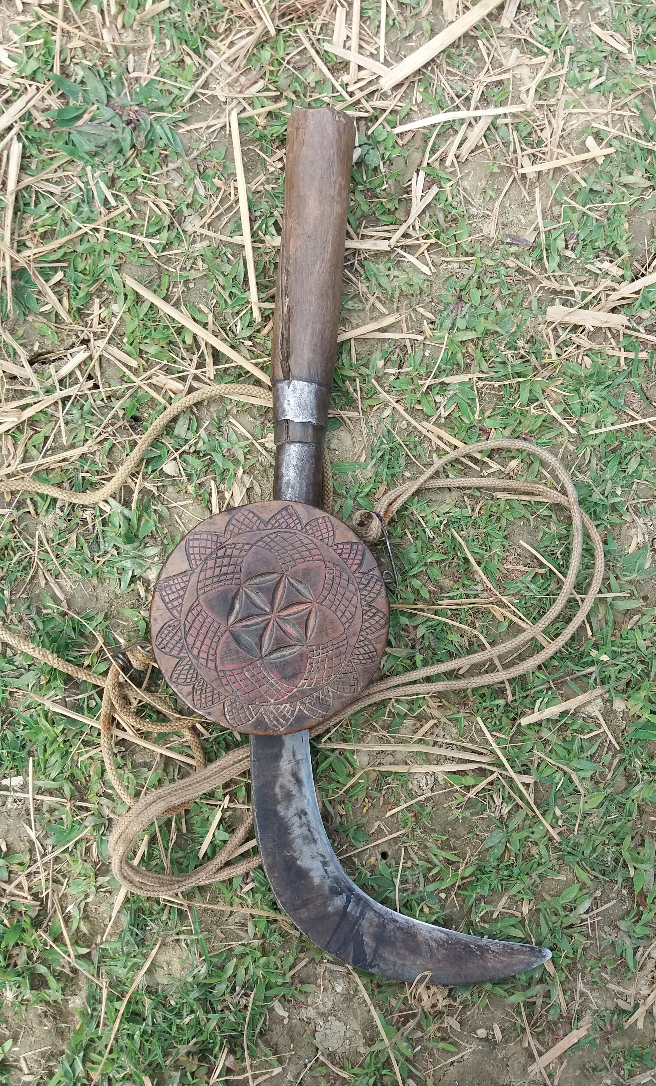 नेपाली: खुर्पेतोमा राखिएको आँसी वा हसिया